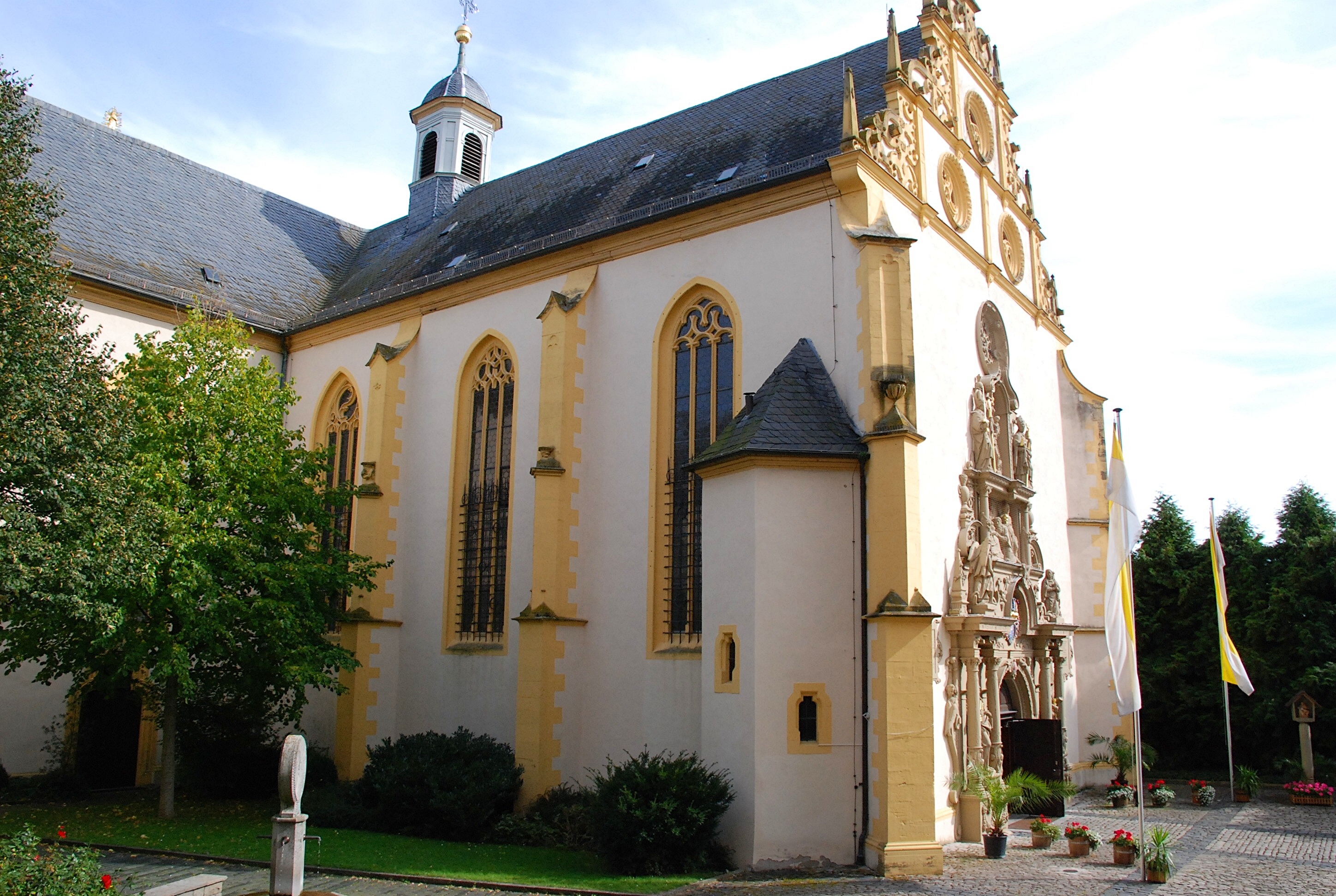 Außenansicht der Wallfahrtskirche 'Maria im Sand' in Dettelbach Exterior view of the Pilgrimage church 'Maria im Sand' in Dettelbach